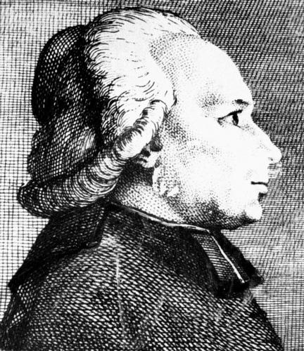 L'abbé Thomas-Marie Royou, fondateur du journal 'L'Ami du Roi'.